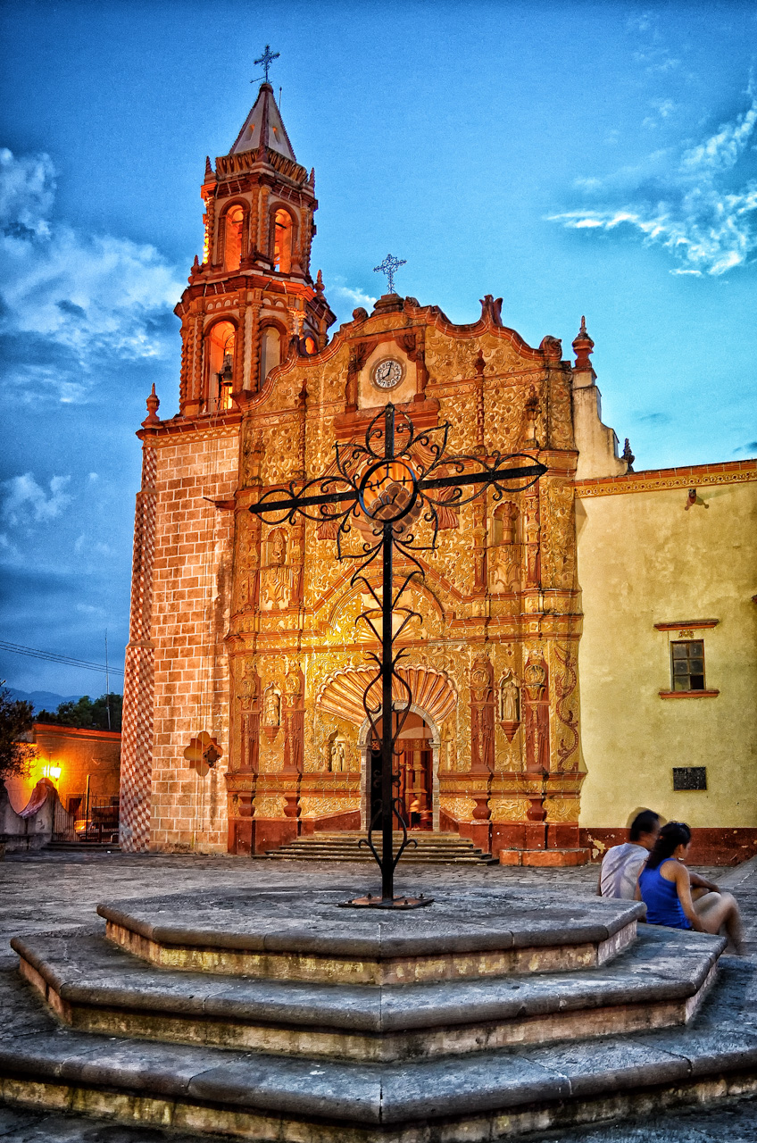 Misión en Jálpan de Serra, Qro. México